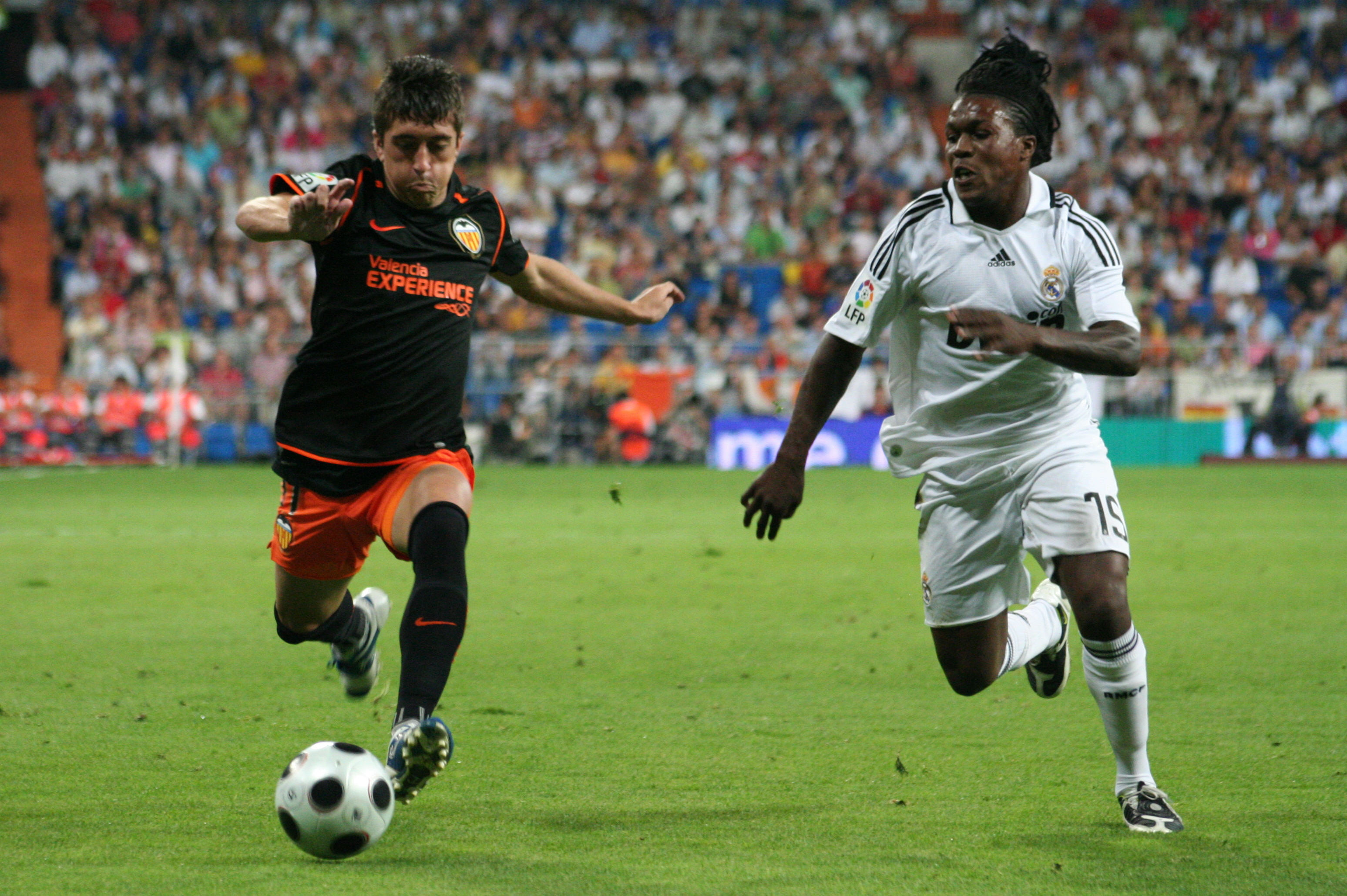 Drenthe lors d'un match contre Valence.